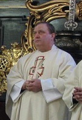 P. Alexej Baláž, Missa Chrismatis, Katedrála Litoměřice, 22.3.2005